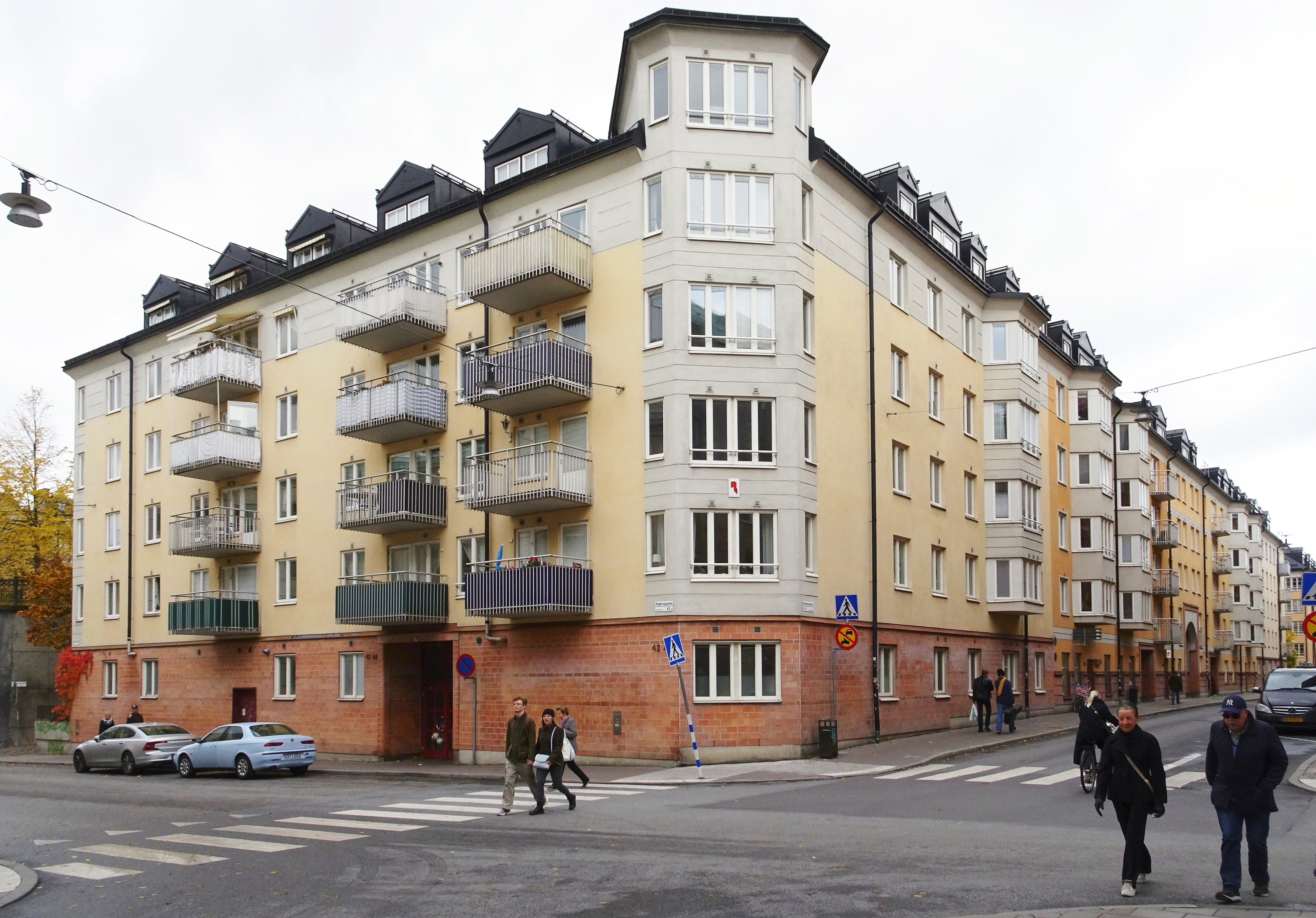 Kvarteret Noe ark från Högbergsgatan, arkitekt Riksbyggen, t.h. sträcker sig Repslagargatan